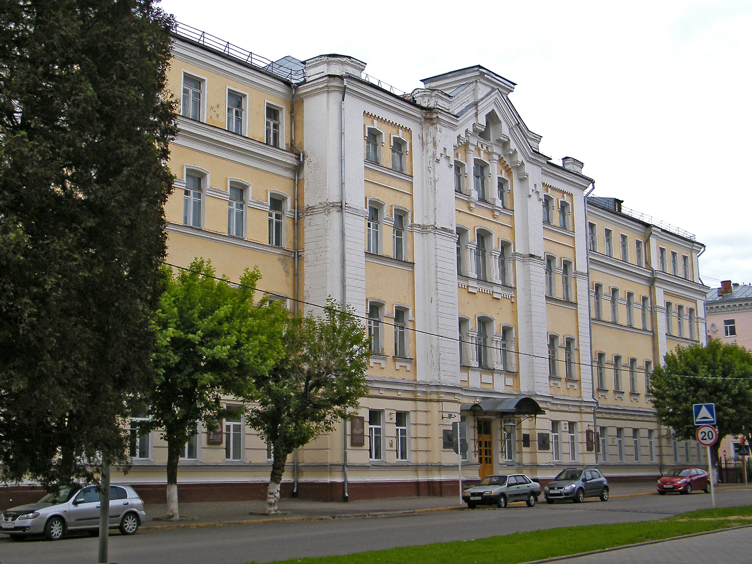 Университет